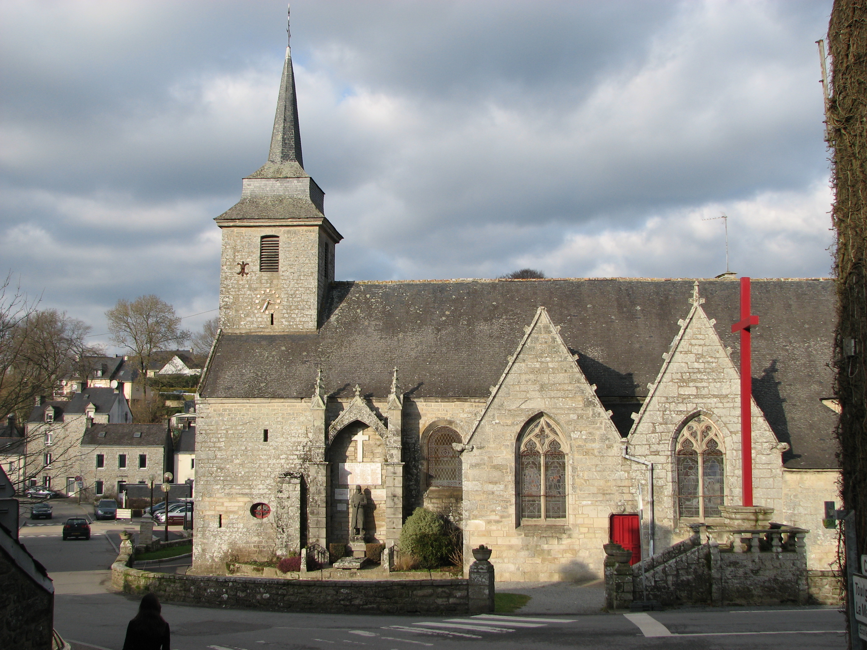 Église Saint-Mayeul de Saint-Nolff (Morbihan)